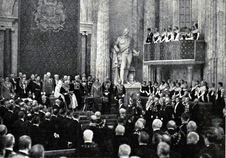 Konungen läser trontalet vid 1934 års riksdags högtidliga öppnande i Rikssalen: fr. v. synas prins Carl junior, prins Bertil och kronprins Gustaf Adolf samt på konungens högra sida prins Gustaf Adolf, prins Carl och prins Eugen; på läktaren fr. v. prins Carl Johan, prinsessan Ingrid, prinsessan Sibylla, kronprinsessan Louise och prinsessan Ingeborg; vid konungens fötter statsministern och nedanför prins Eugen utrikesministern.